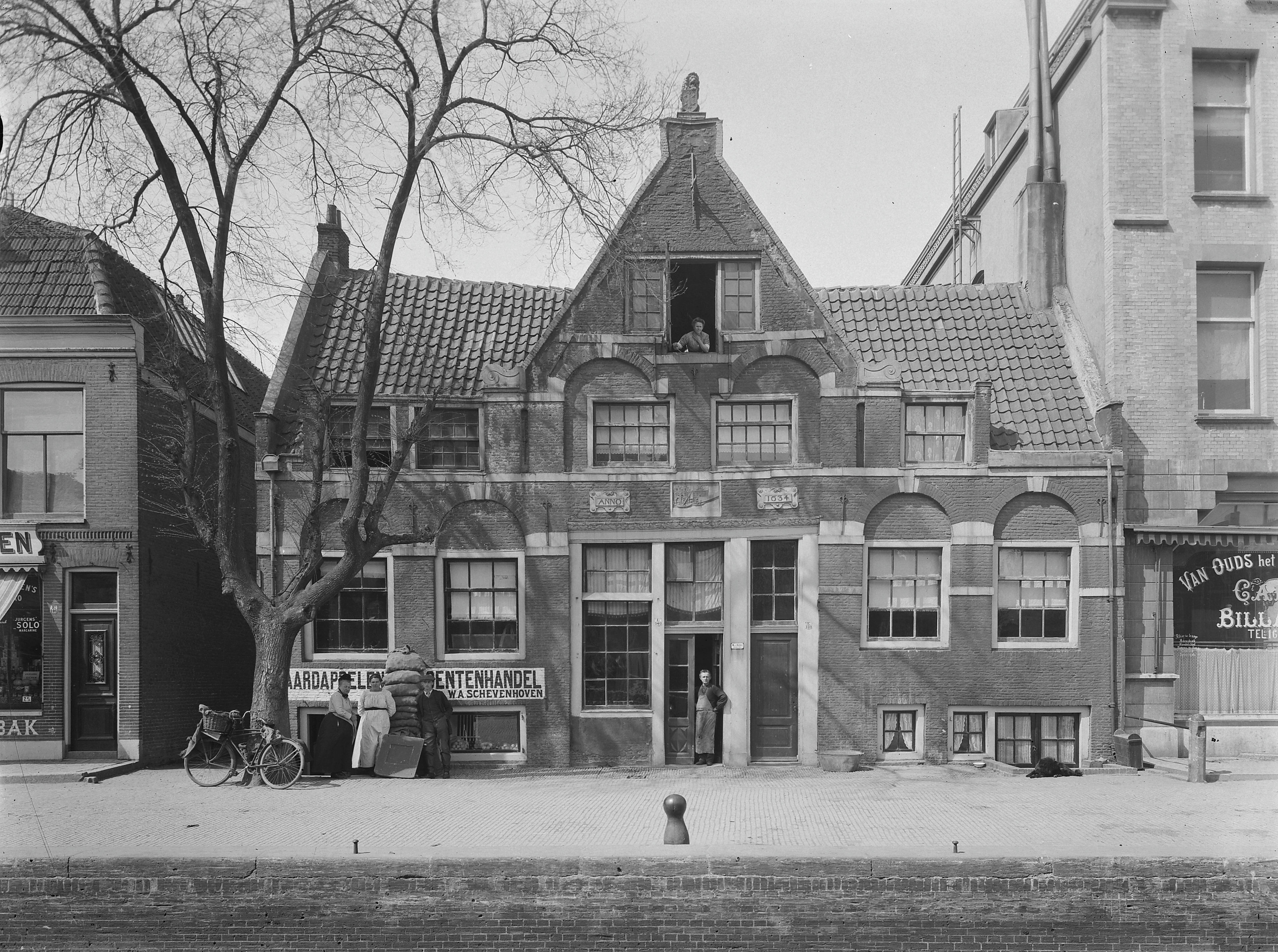 Aalsmeerder Veerhuis: Overzicht voorgevel